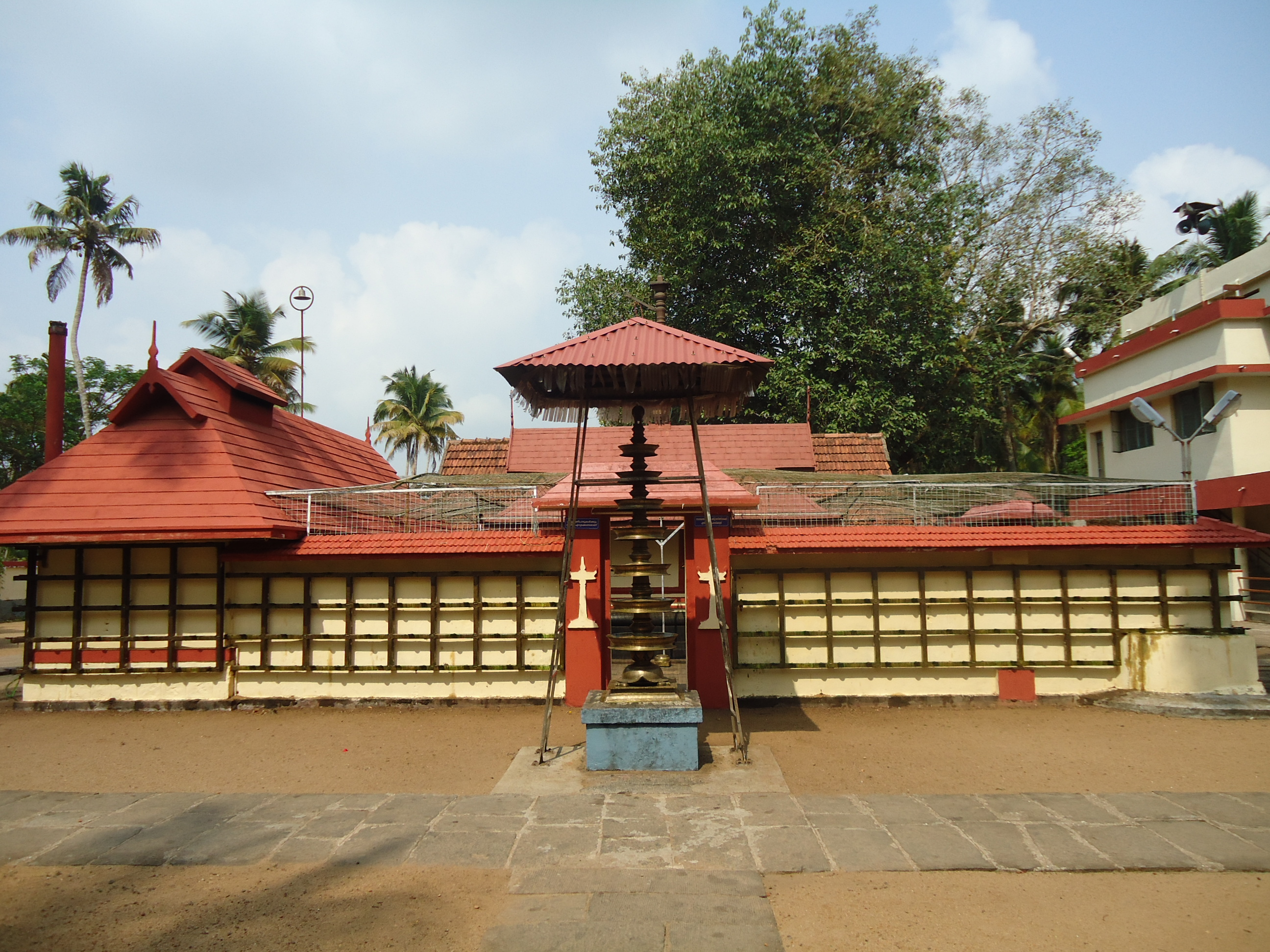 Kothakulangara Sree Bhagavathi Temple Angamaly